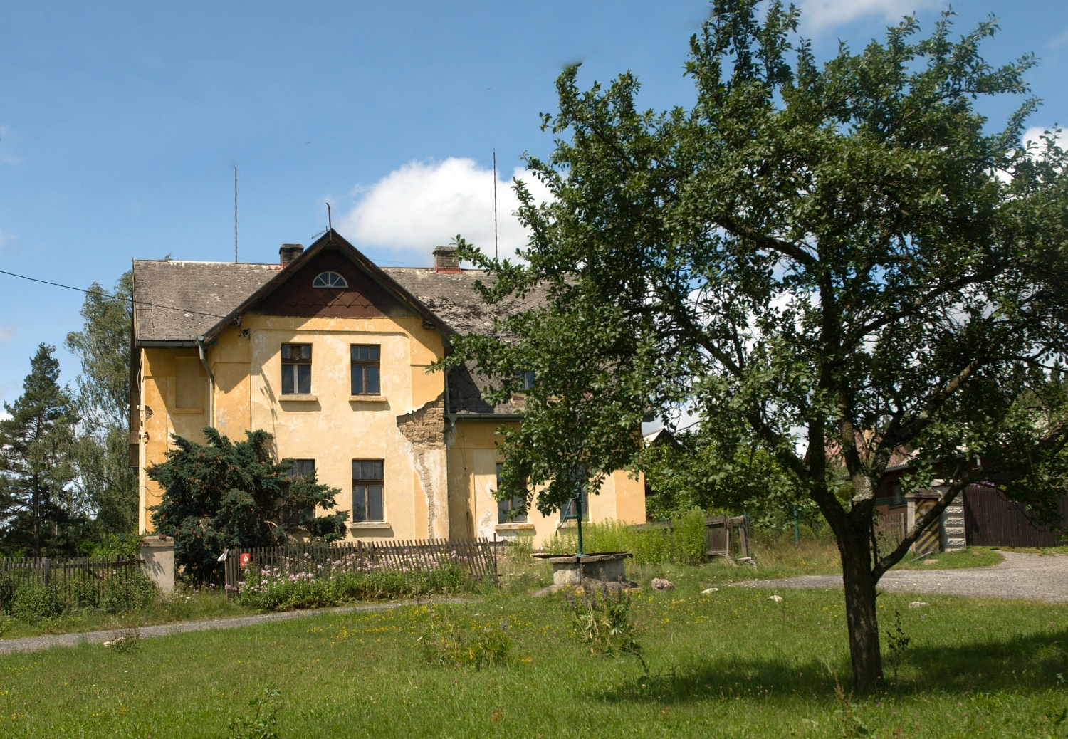 Vesnice Spankov